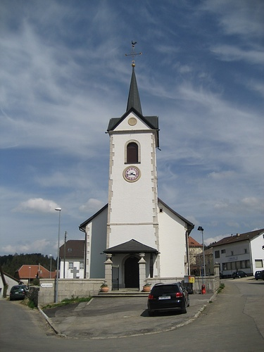 Eglise Saints-Pierre-et-Paul des Pommerats (Suisse)